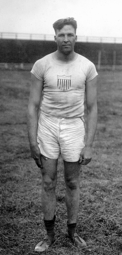 Pope (U.S.A.) lancement du disque : [photographie de presse] / Agence Meurisse